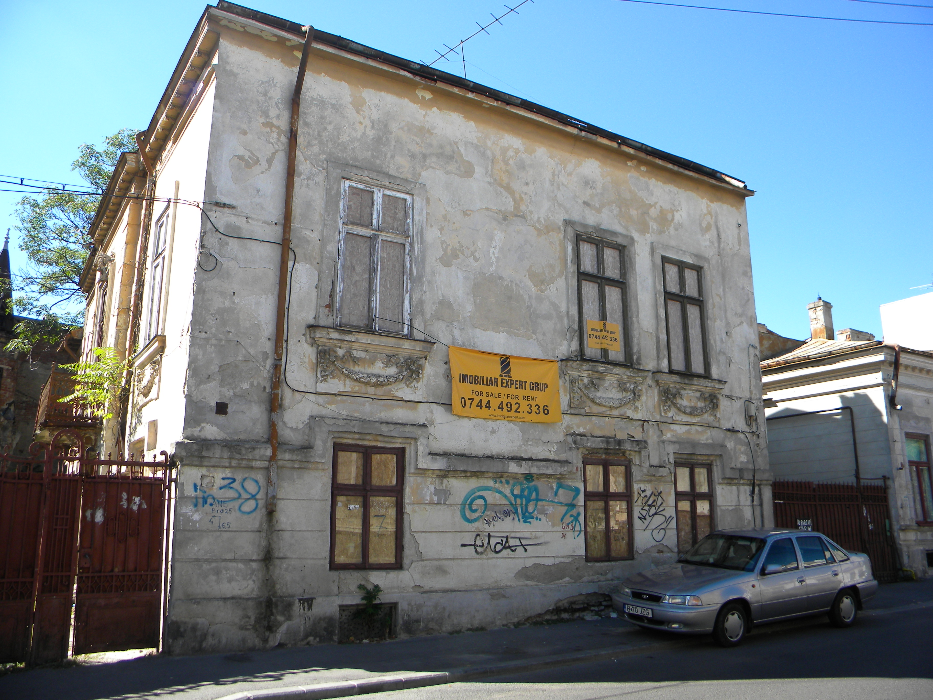 Bucuresti, Romania, Strada Hristo Botev nr. 38 (casa), sect. 3